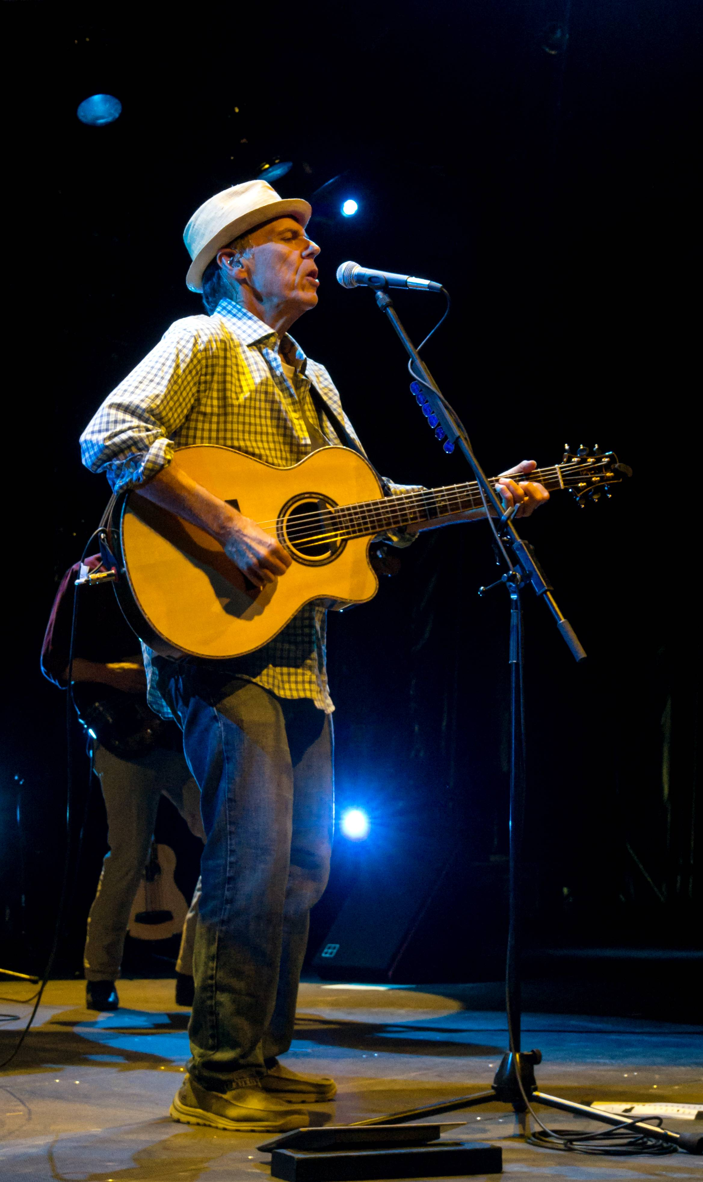 Bilder vom ZMF 2015 John Hiatt & The Combo 09. Juli 2015